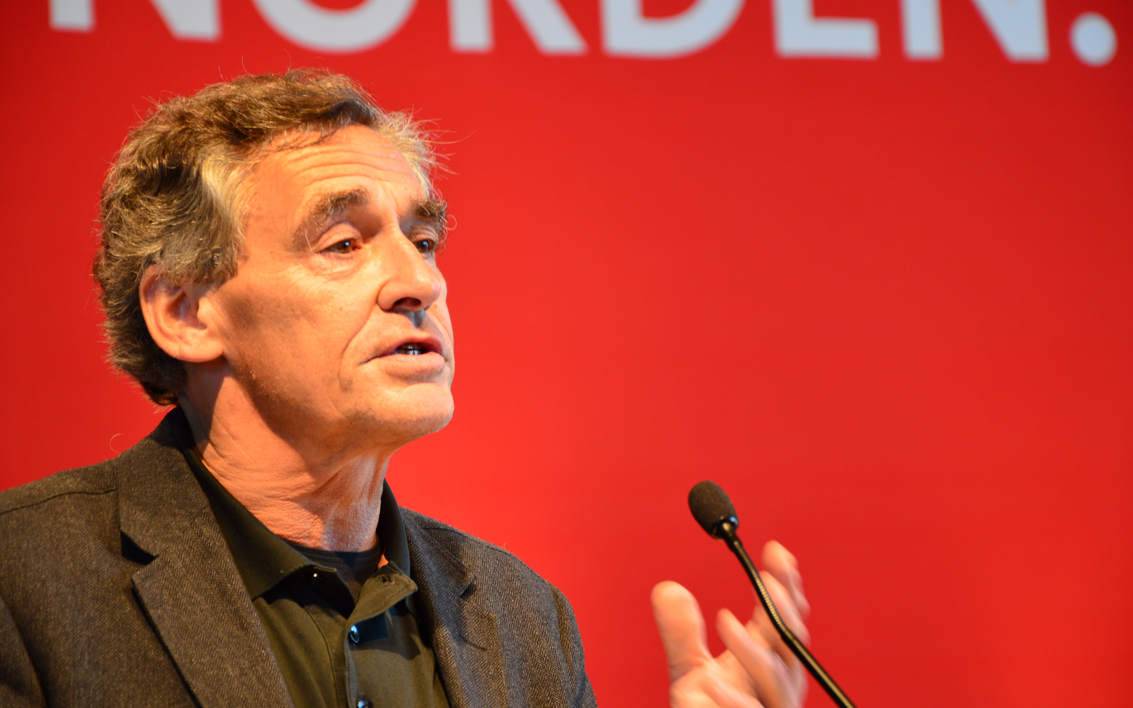 Bernd Saxe redet auf Landesparteitag der SPD Schleswig-Holstein im September 2014 (Lübeck)